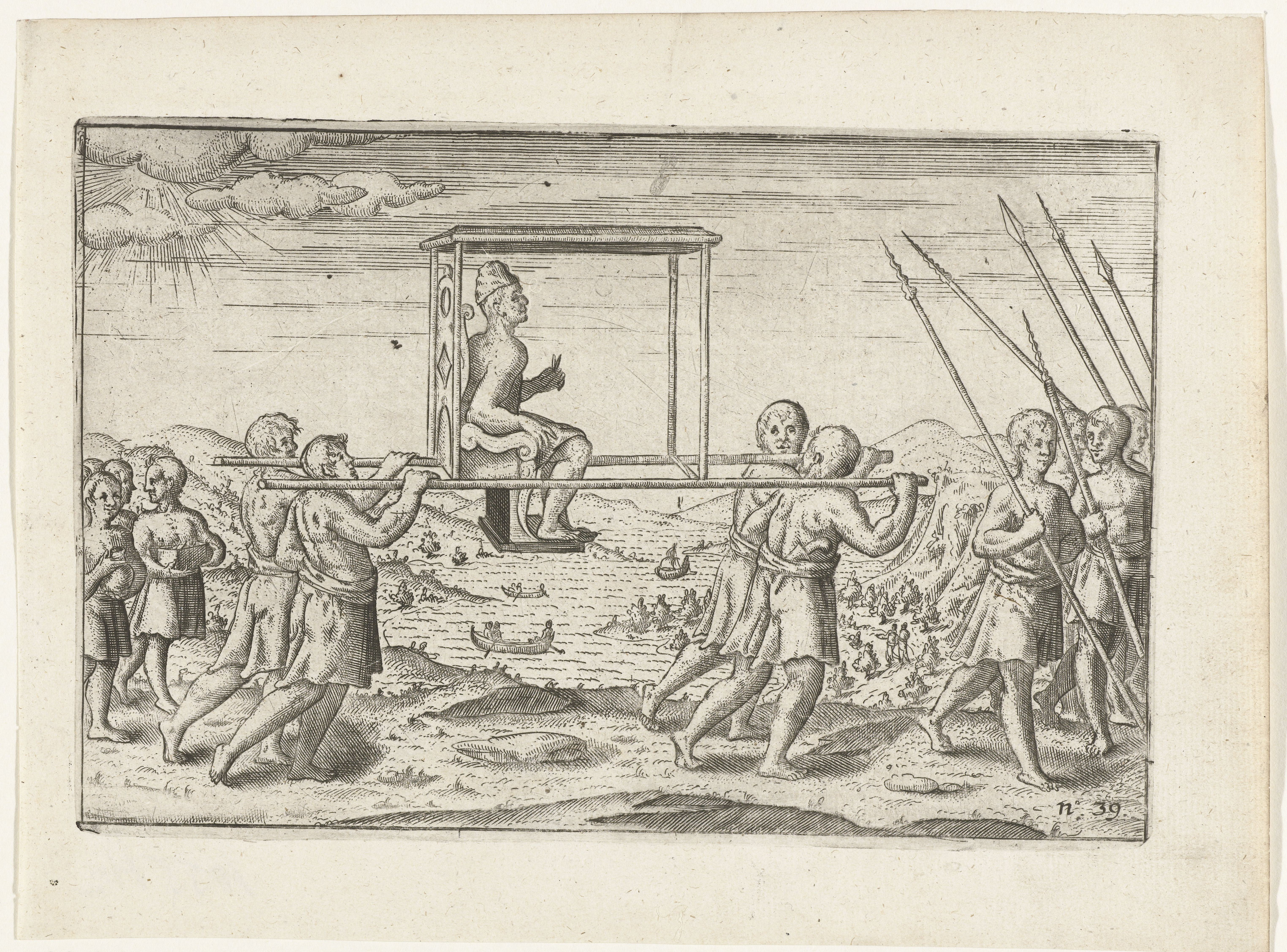 IdentificatieTitel(s): Edelman in draagstoel op Bali, 1597Objecttype: prent nieuwsprent Objectnummer: RP-P-OB-80.272Catalogusreferentie: FMH 1055-AI(2)/39Atlas van Stolk 982Omschrijving: Een edelman op Bali laat zich in een draagstoel vervoeren, februari 1597. Afdrukken van de opgewerkte platen voor de oorspronkelijke illustraties in het reisverslag van de Eerste Schipvaert van Cornelis de Houtman naar Oost-Indië in 1595-1597. No. 39.VervaardigingVervaardiger: prentmaker: anoniemPlaats vervaardiging: Noordelijke NederlandenDatering: 1597 - 1598 en/of 1646Fysieke kenmerken: ets en gravureMateriaal: papier Techniek: etsen / graveren (drukprocedé)Afmetingen: plaatrand: h 145 mm × b 220 mmToelichtingGebruikt als illustratie eerst in: Willem Lodewijcksz, D'eerste boeck. Historie van Indien, waer inne verhaelt is de avontueren die de Hollandtsche schepen bejeghent zijn, Cornelis Claes, Amsterdam 1598. In deze opgewerkte staat gebruikt in: De Eerste Schipvaerd der Hollandsche Natie naer Oost-Indien, waer inne verhaelt wordt al wat haer sonderlings onder wegen bejegent is ... ghetrocken uyt verscheyden Iournalen ofte dagh-registers daer van ghemaeckt, zeer vermaeckelijck ende nut om lesen. Opgenomen in: I. Commelin, Begin ende voortgangh, van de Vereenighde Nederlantsche Geoctroyeerde Oost-Indische Compagnie, J. Janssonius, Amsterdam 1646. Genummerd: 39.OnderwerpWat: exploration, expedition, voyage of discoverylandscapes in tropical and sub-tropical regions(carrying a person in a) sedan-chairEerste Schipvaert (1595-1597)Wanneer: 1597-02 - 1597-02Waar: BaliWie: Cornelis de HoutmanVerwerving en rechtenVerwerving: aankoop 1881Copyright: Publiek domein